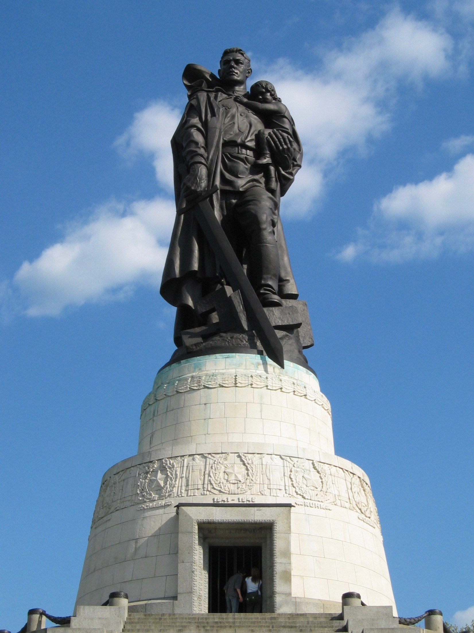 Berlin Treptow Ehrenmal